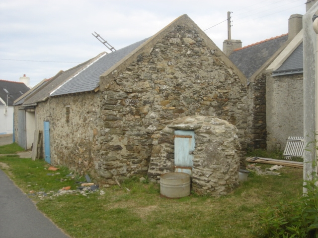 Longère, avec son puits couvert et fermé, maison traditionnelle près du Petit cosquet, dans un des nombreux hameaux de Belle-Île-en-Mer (56)